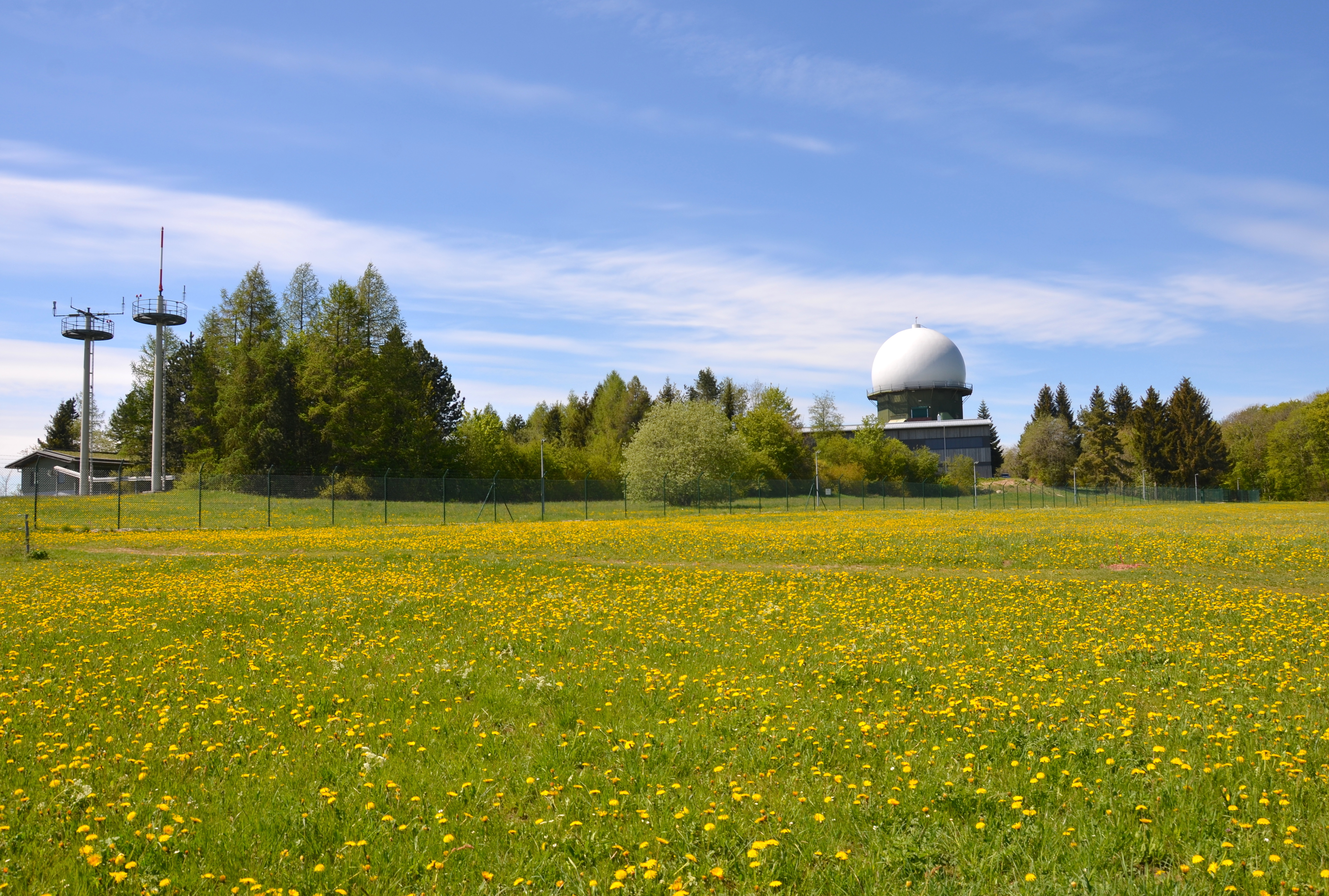 Radarkuppel auf dem Weichenwang, Schwäbische Alb (Zollernalbkreis)